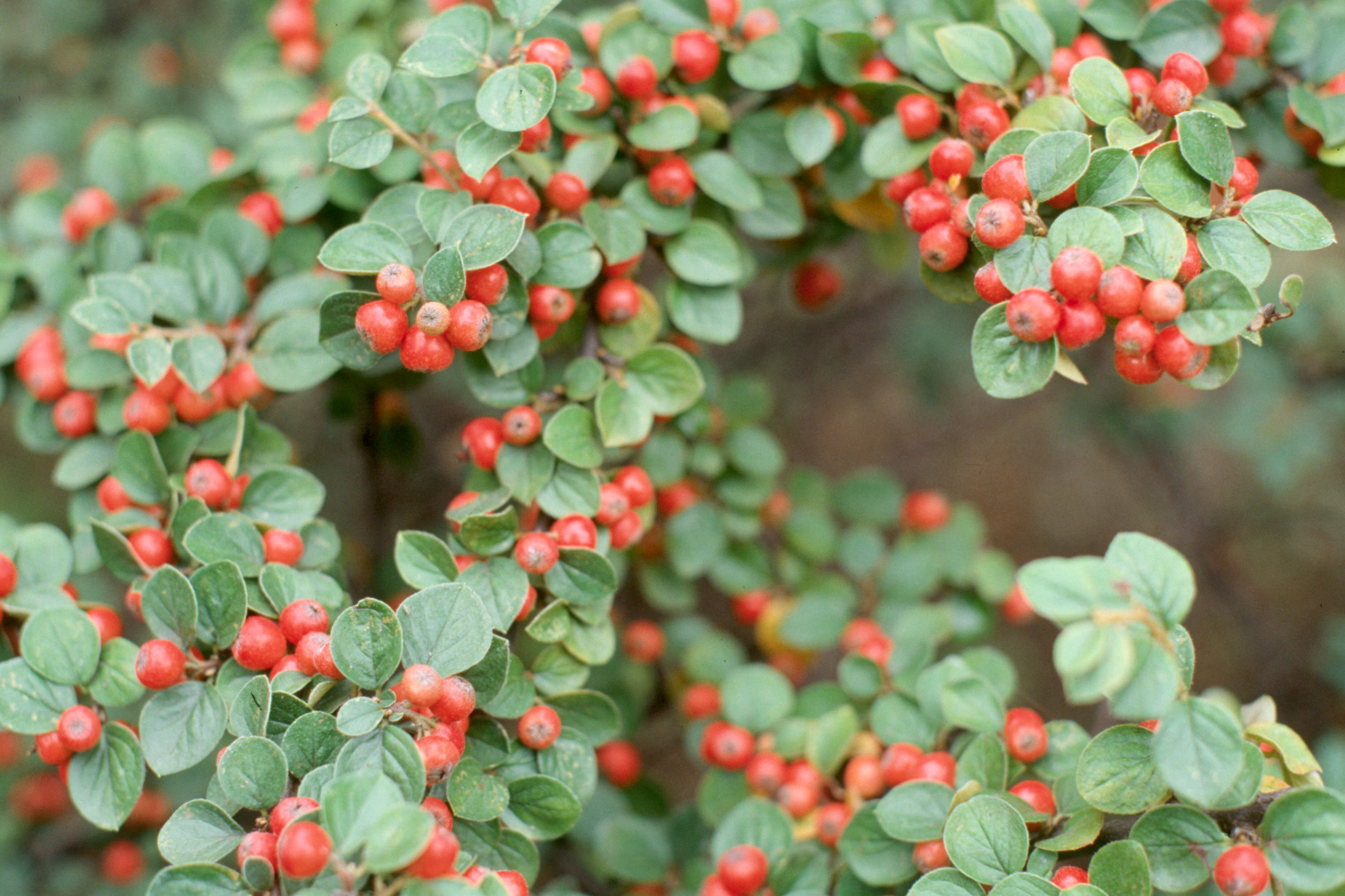 Cotoneaster horizontalis. Real Jardín Botánico de Madrid.